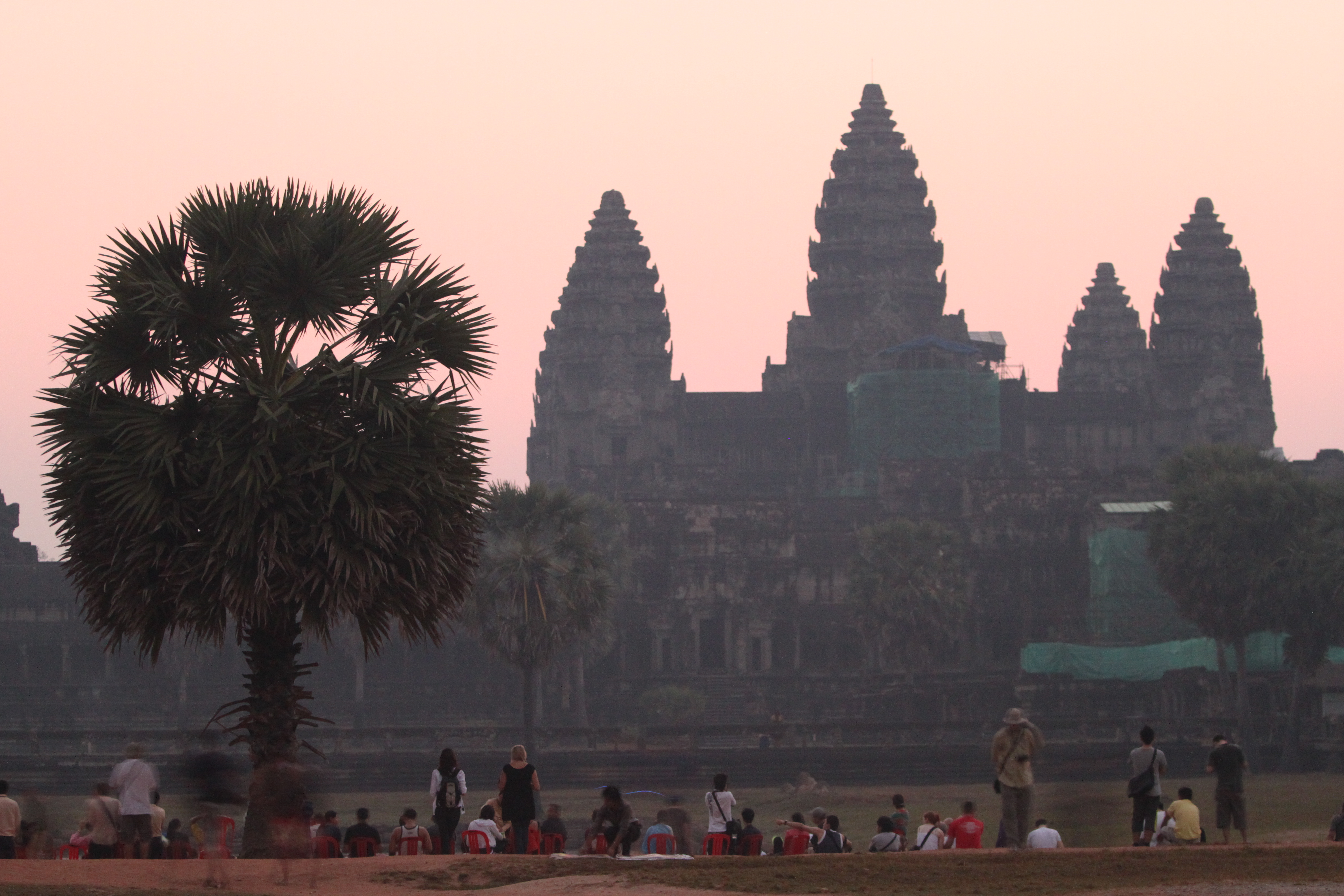 Angkor Wat1